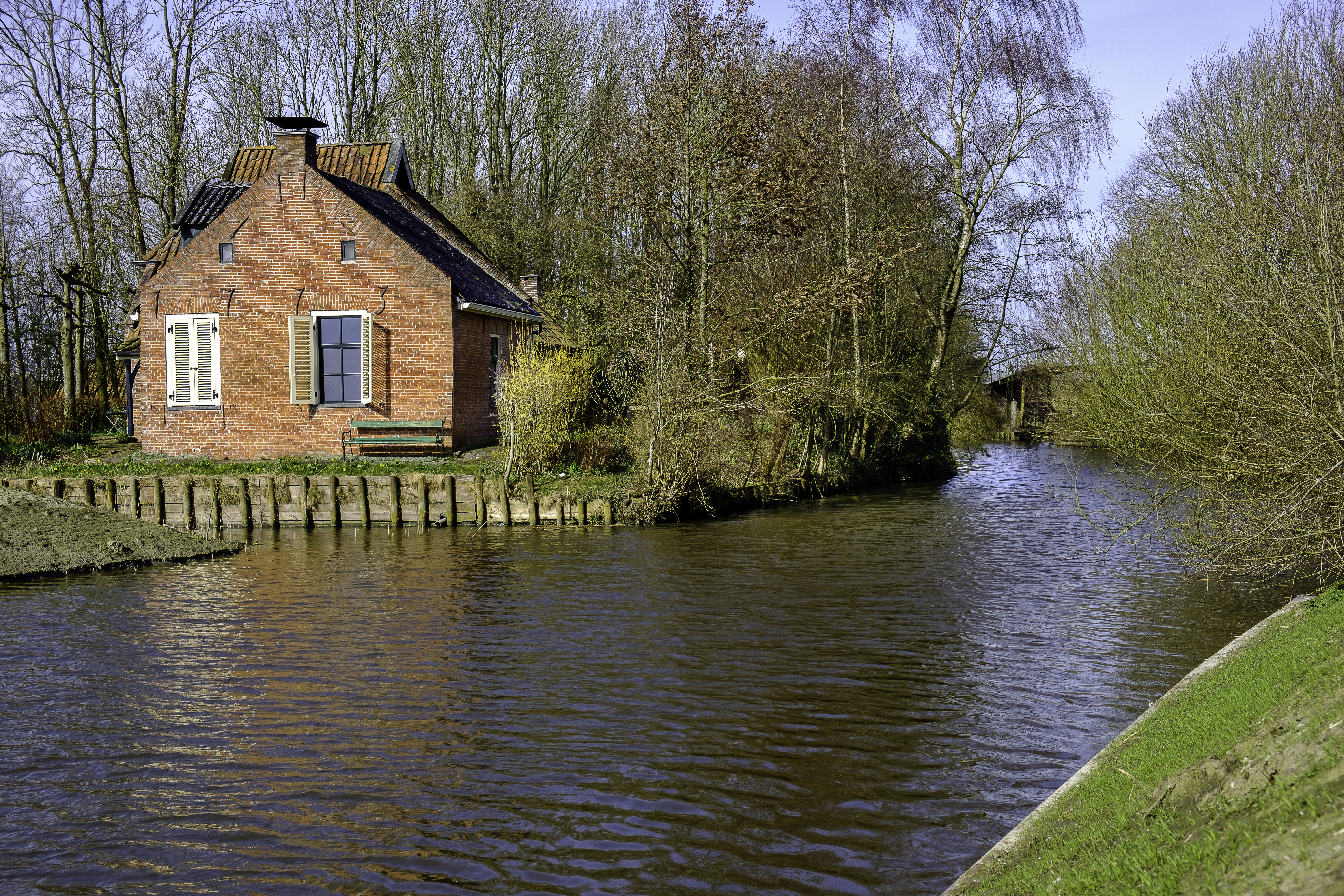 Molenaarswoning uit 1773 aan de Rasquerdermaar nabij de Nieuwe Til